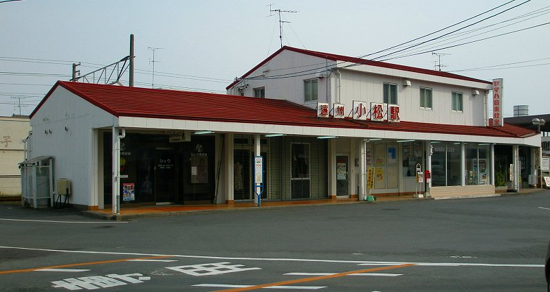 遠州鉄道 遠州小松駅… 撮影日時：2007. 4/ 8 撮影者：健ちゃん